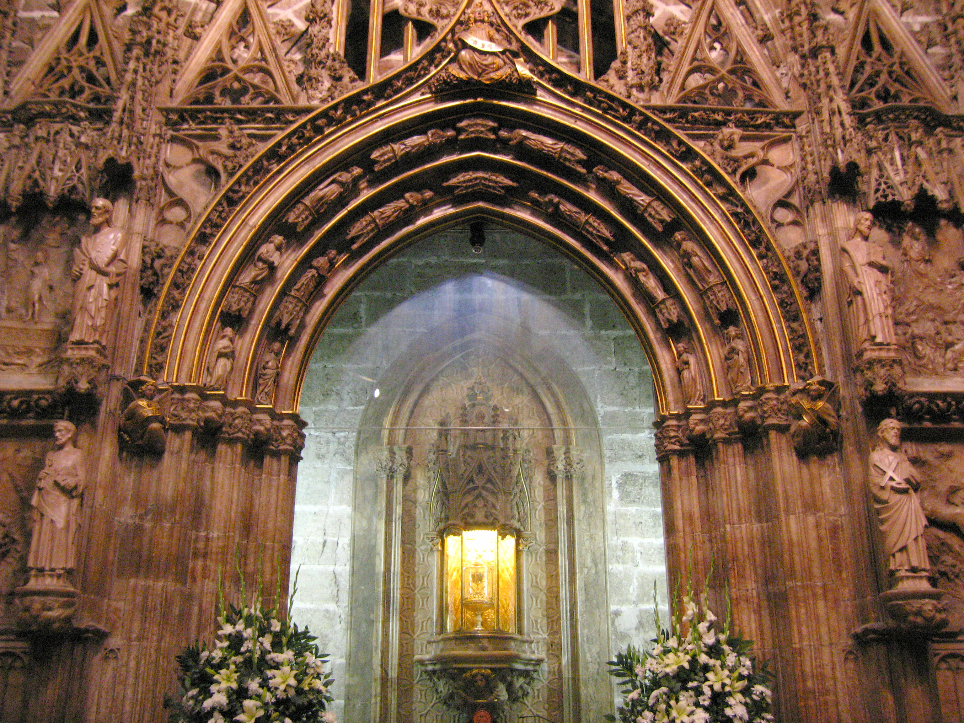 Sant Calze de la Seu de València